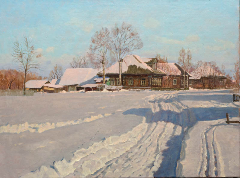 "Деревня"